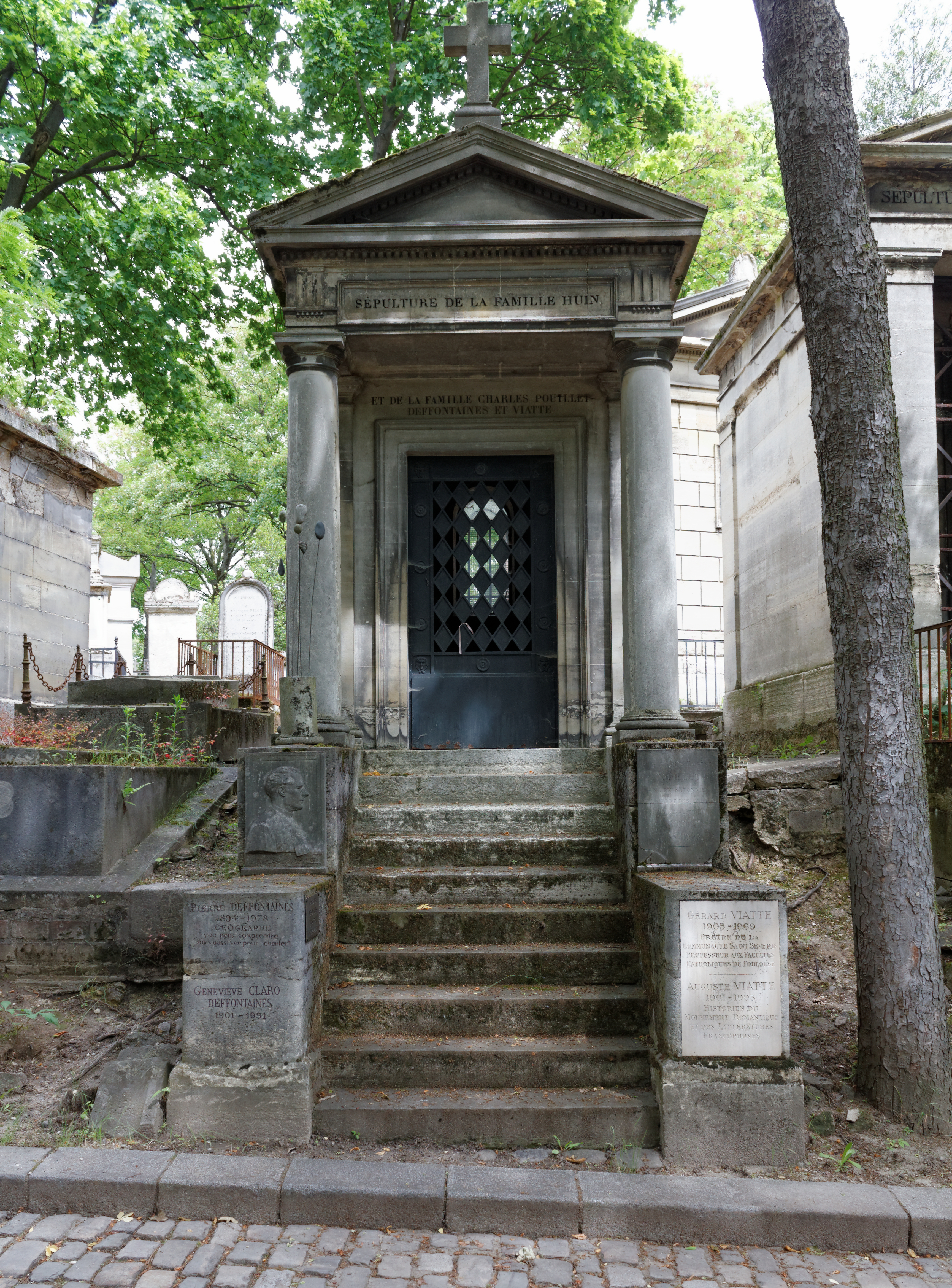 Chapelle comportant deux bustes d'enfants.